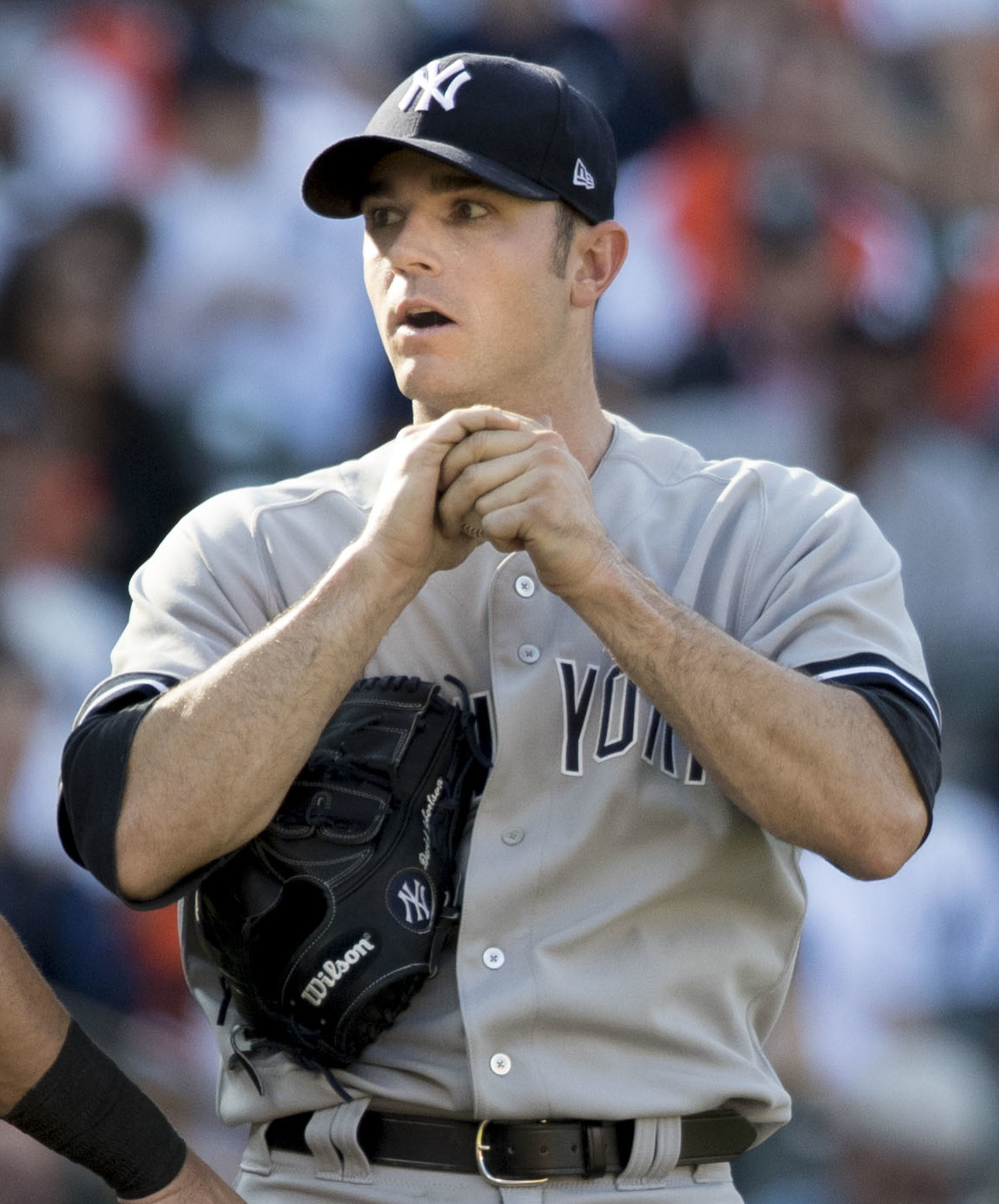 Yankees at Orioles 9/4/17